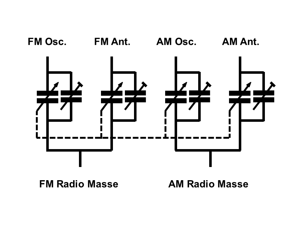 Schaltung eines vierfachen Folien-Drehkondensators auf einer Welle mit vier gesonderten Trimmern